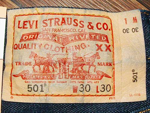 Catégorie:Jeans